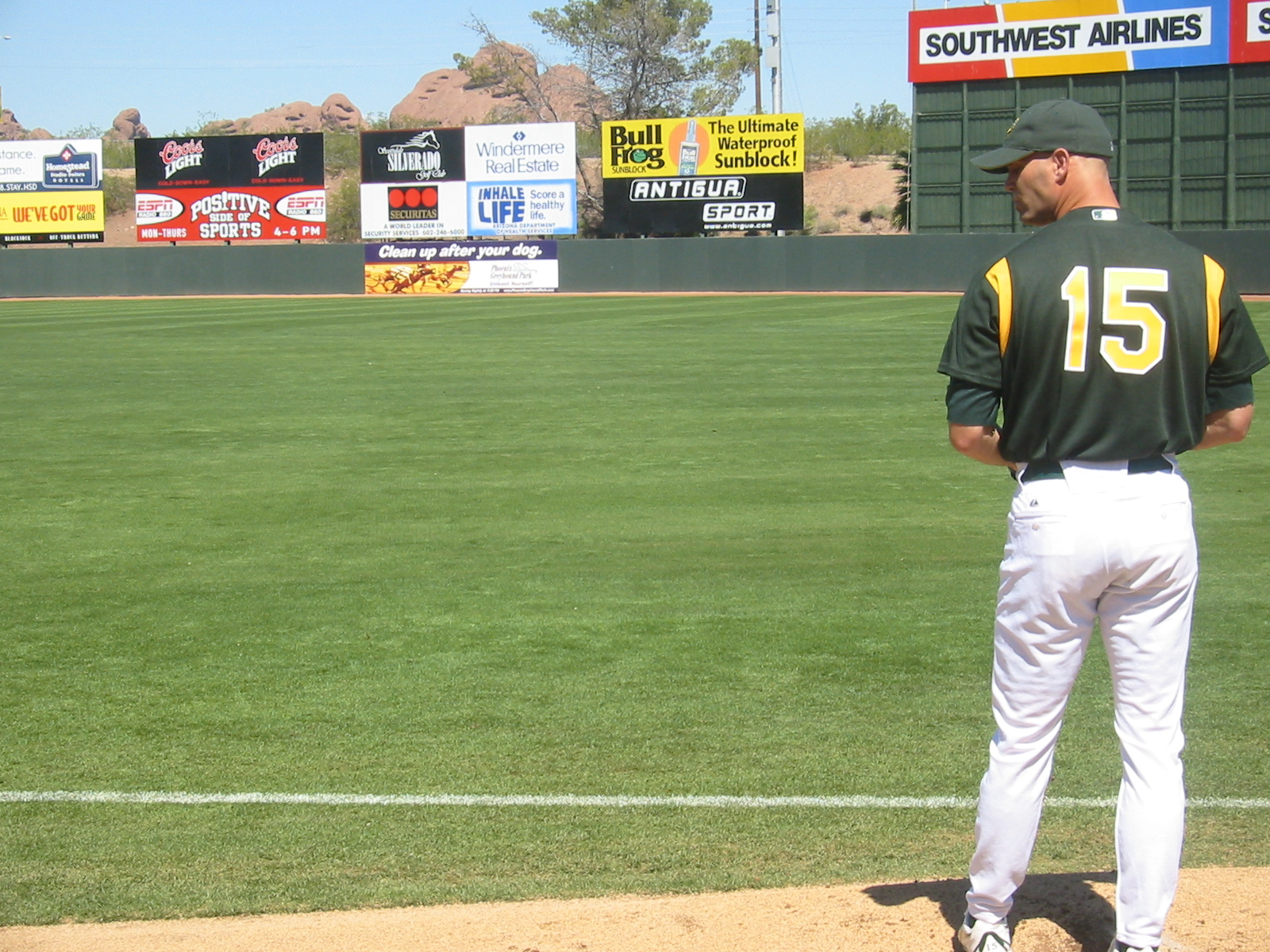 Tim Hudson